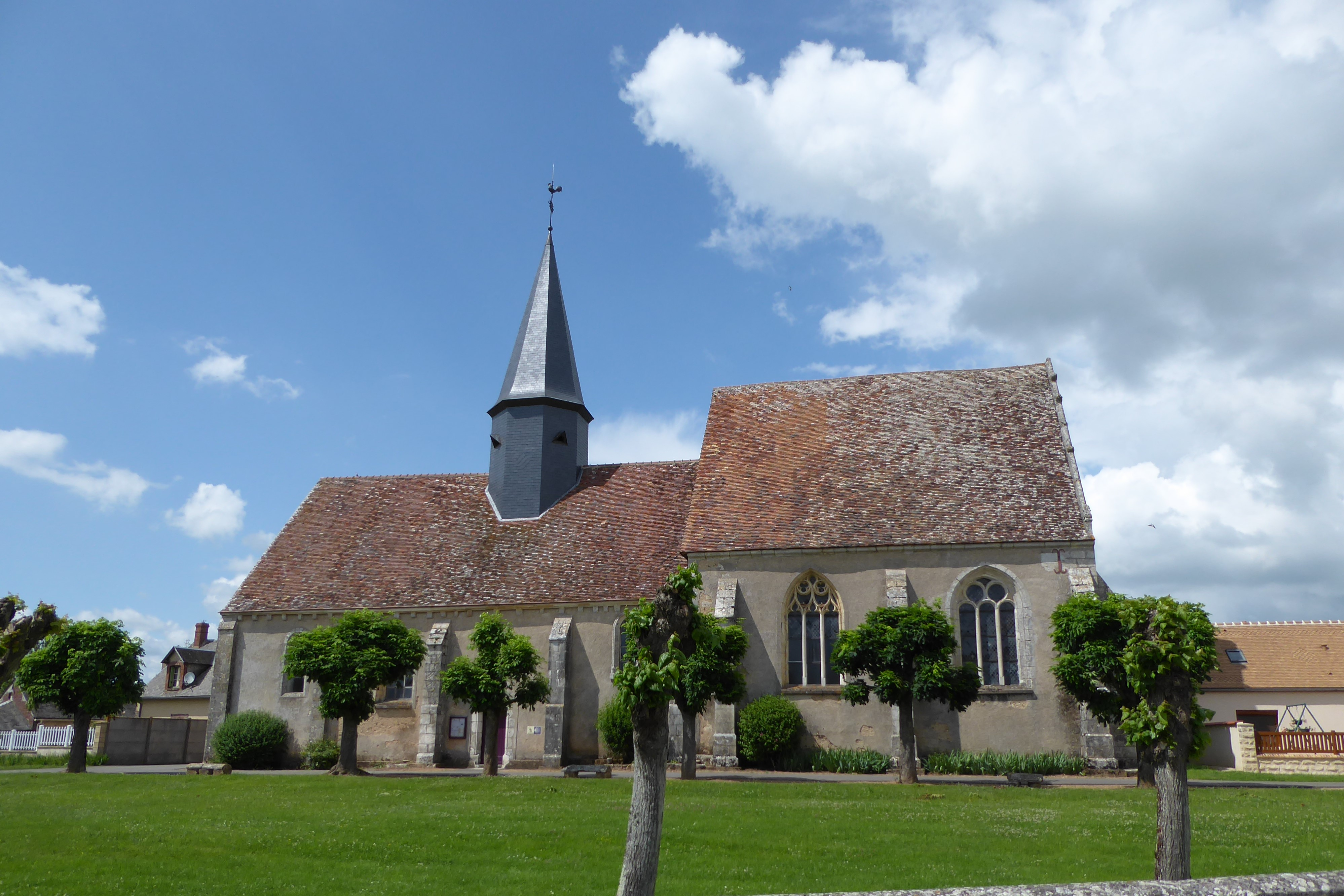 église Saint-Denis, Vitray-en-Beauce, Eure-et-Loir, France.